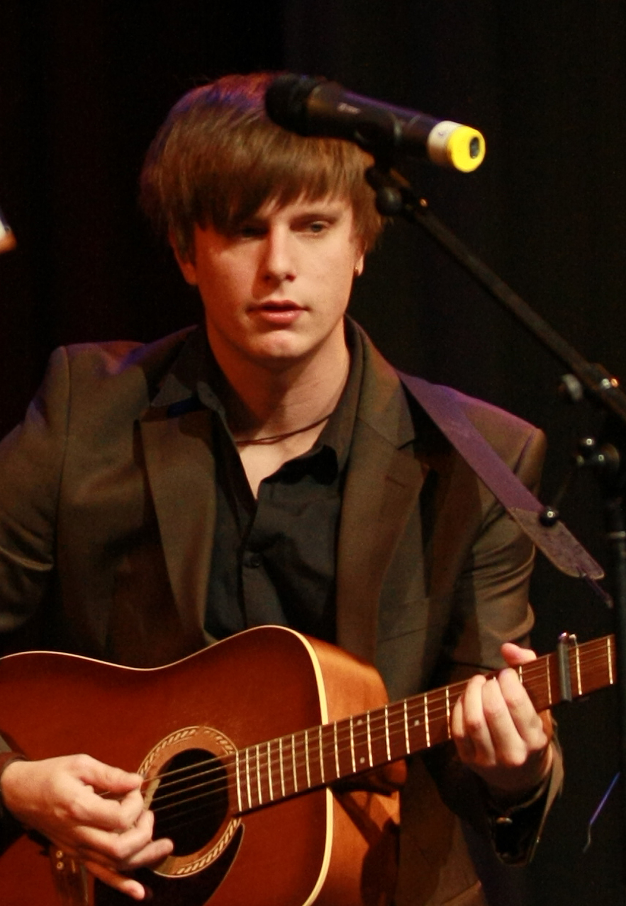 Moritz Neumeier, während eines Aufritts am 25.01.2012 auf der Freiburger Kulturbörse (als Team & Struppi, mit Jaspar Diedrichsen)